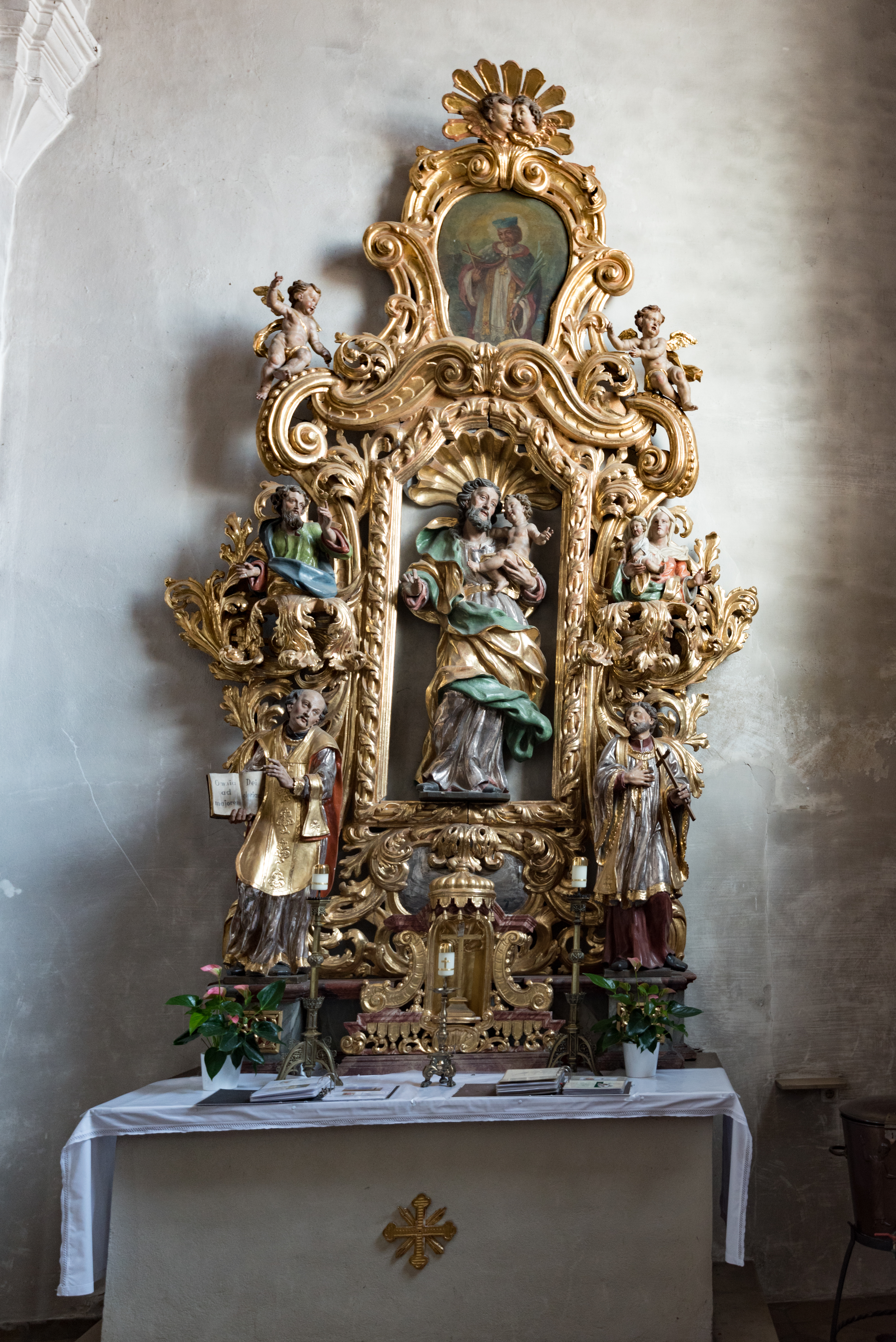 Velburg, Burgstraße 7, St. Johann Baptist